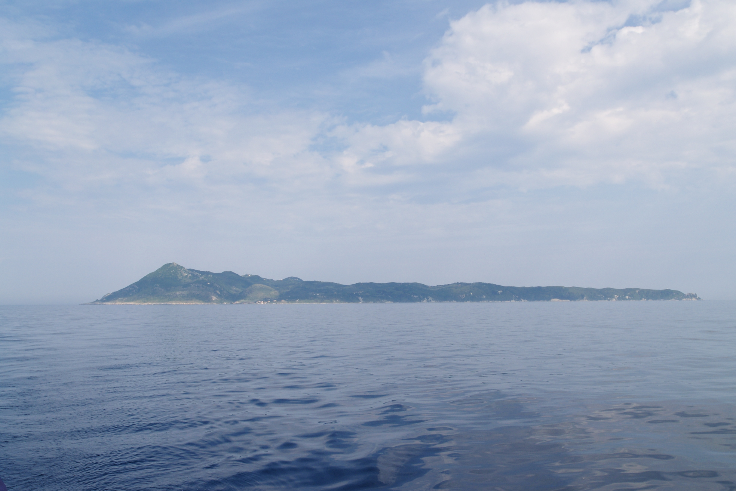 Othonoi ist eine kleine griechische Insel nordwestlich von Korfu. Ansicht von Südost